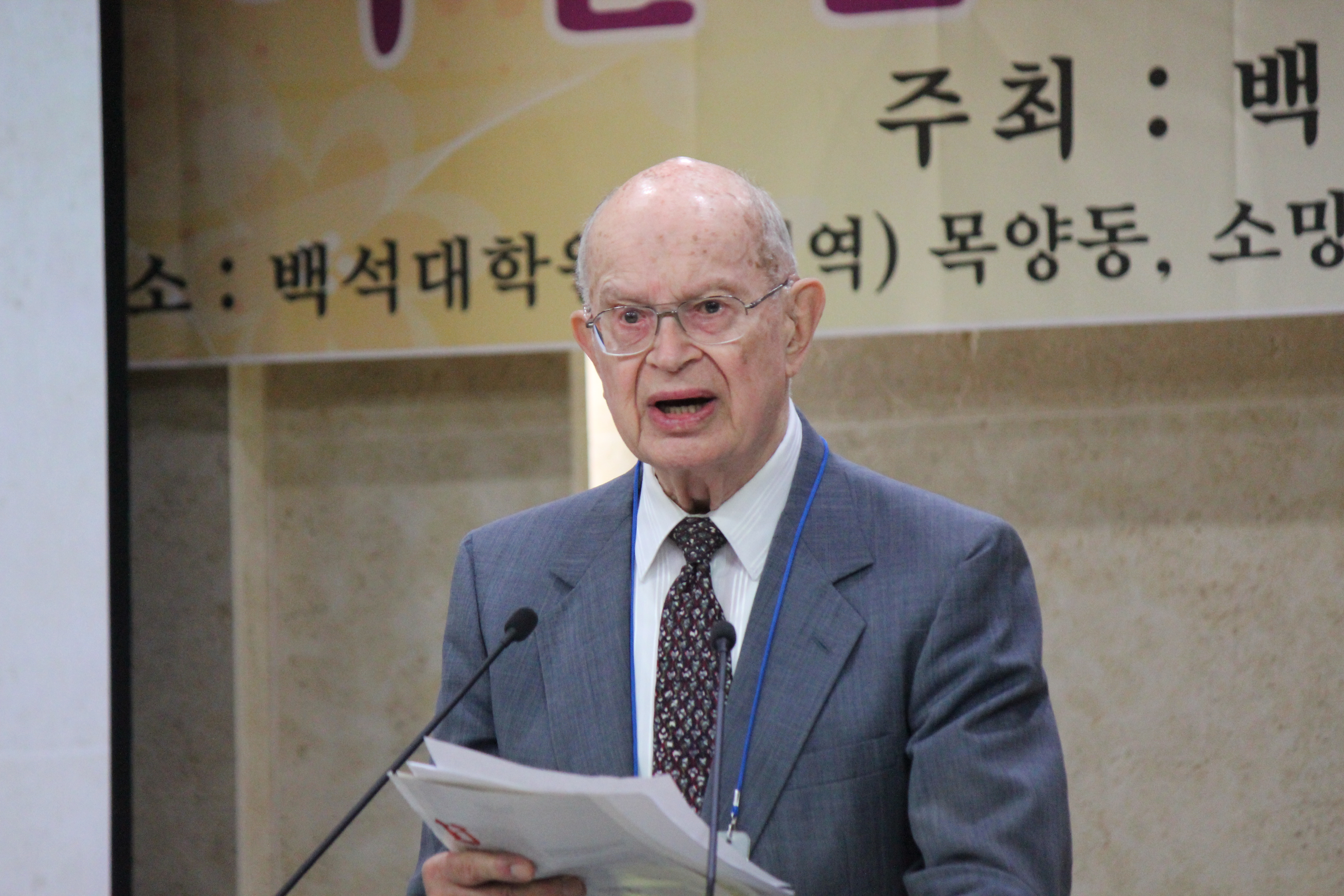 헤셀링크 박사(I. John Hesselink), 백석대학교